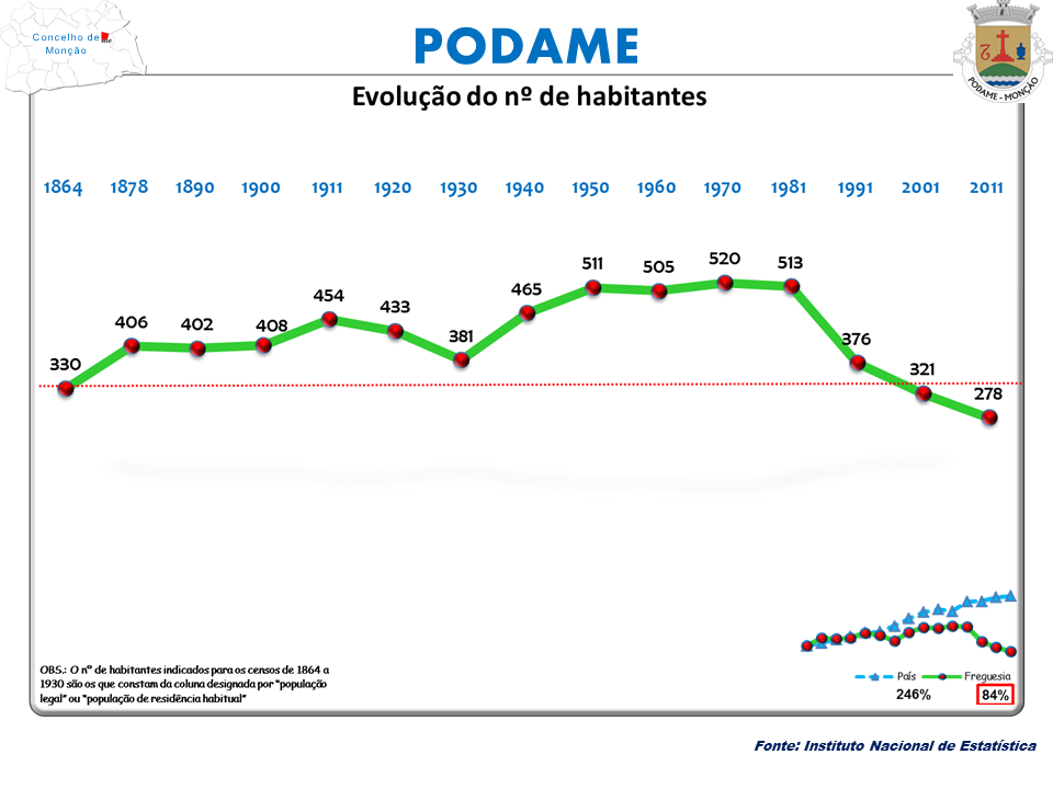 Censos 1864/2011